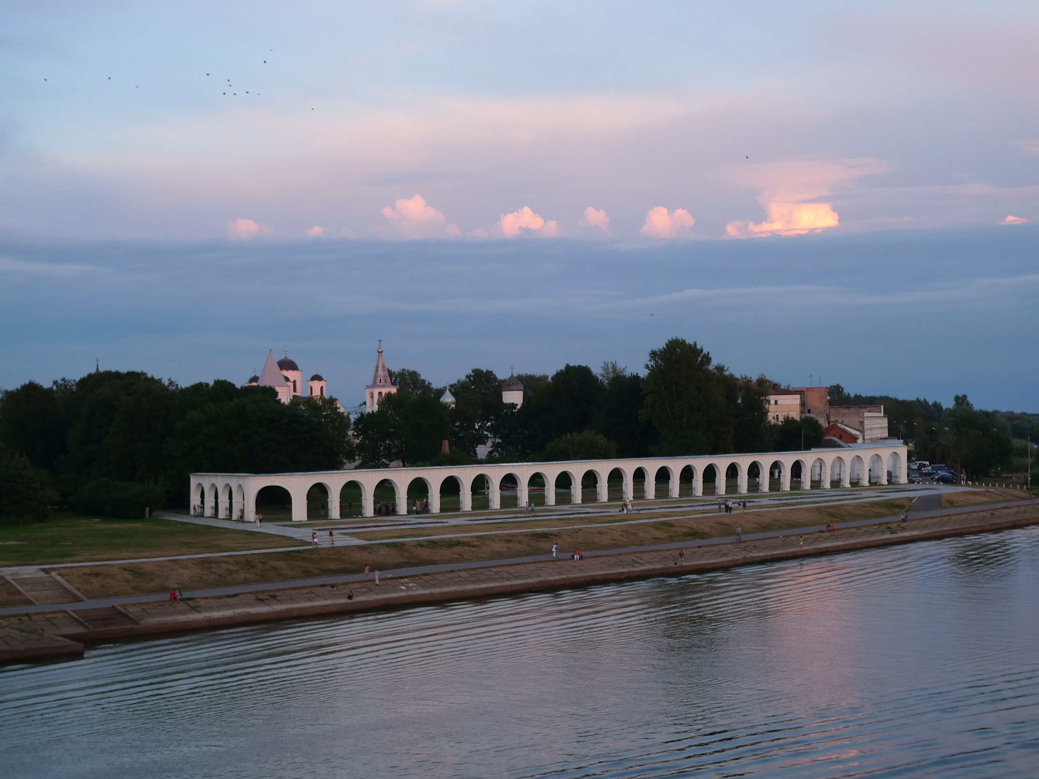 Аркада Гостиного двора (Новгородская область, Великий Новгород, Ярославово Дворище)